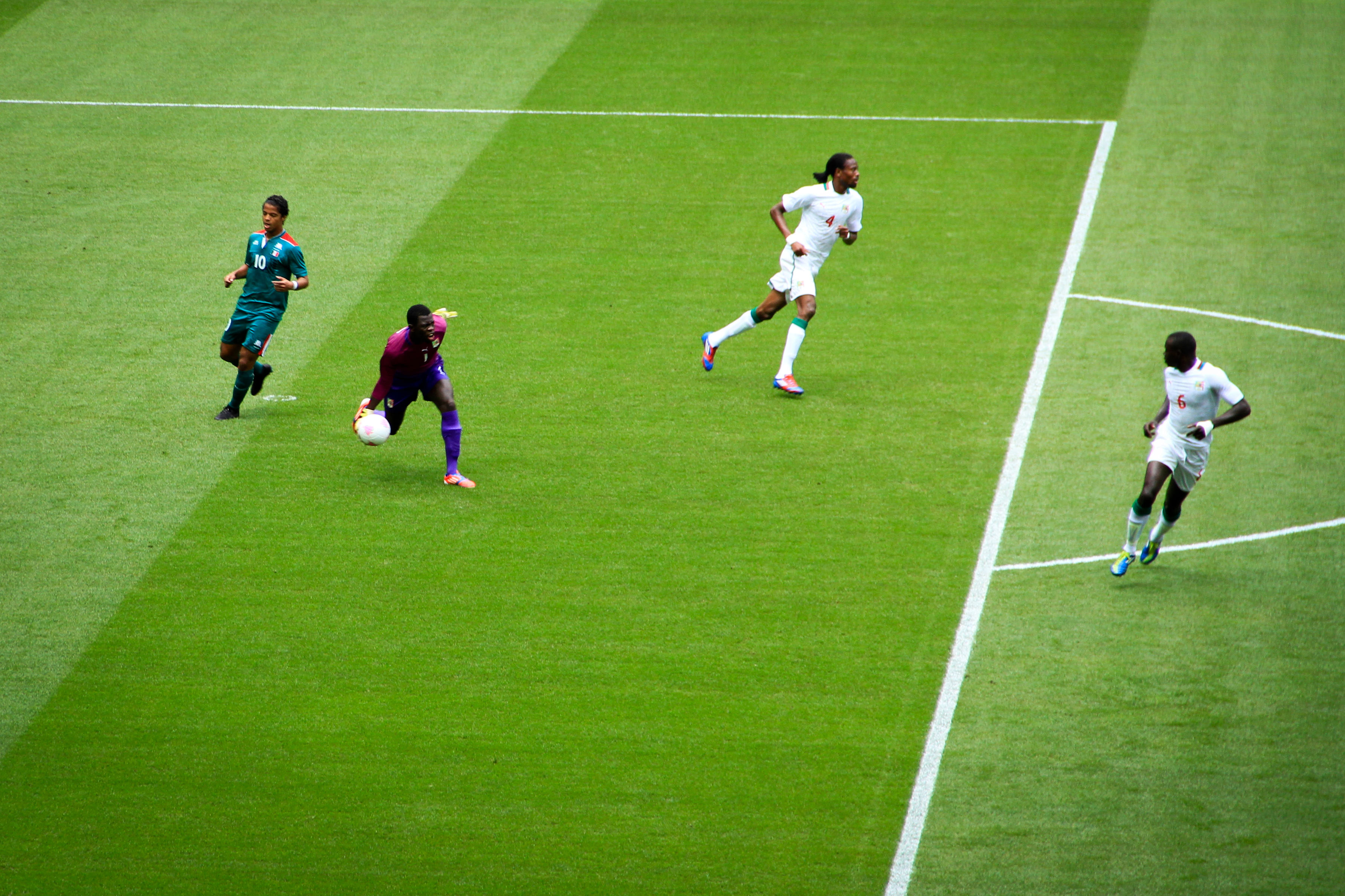 Ousmane Mané